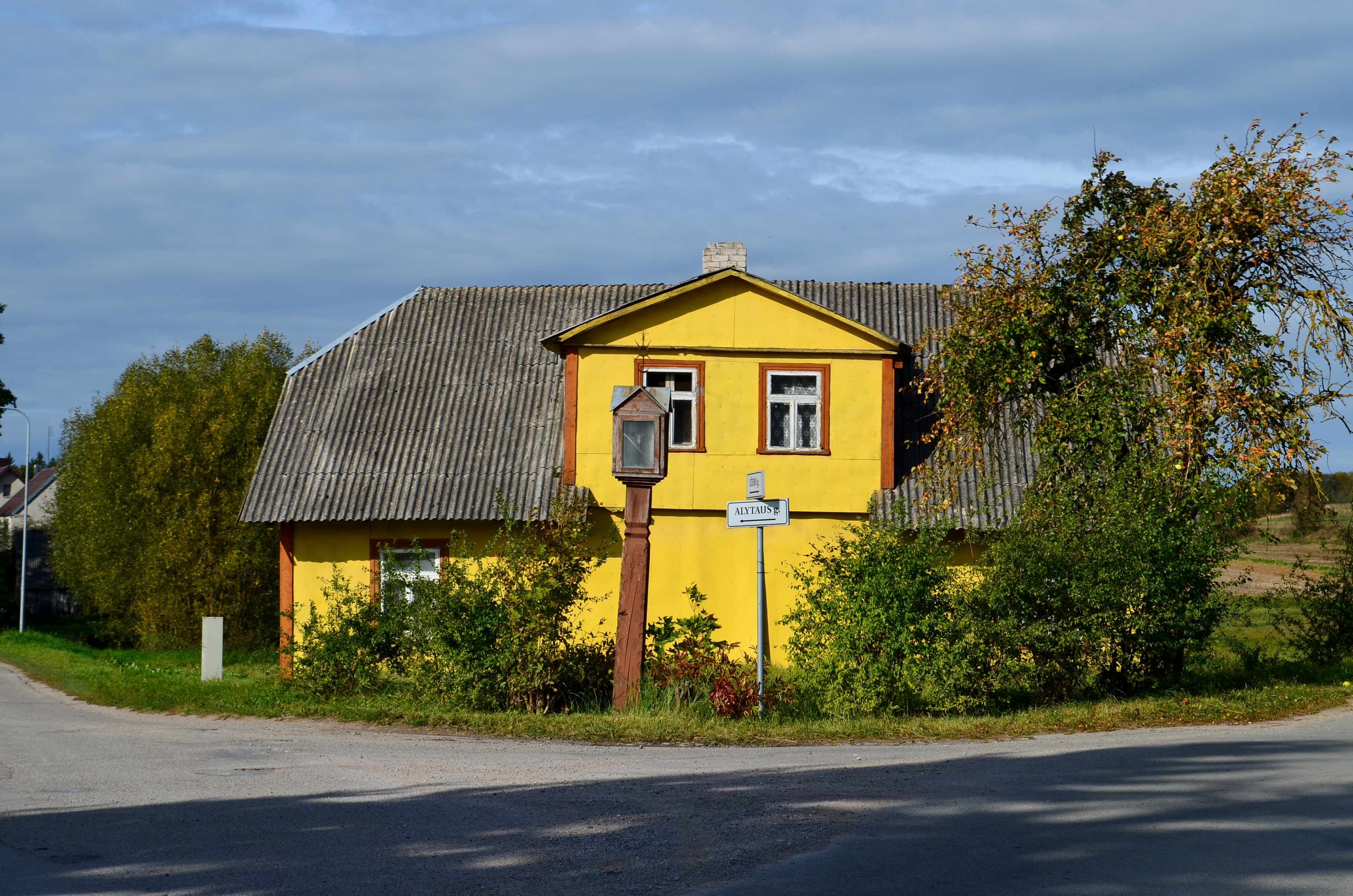 Koplytstulpis prie namo, Kražiai, Kelmės raj.